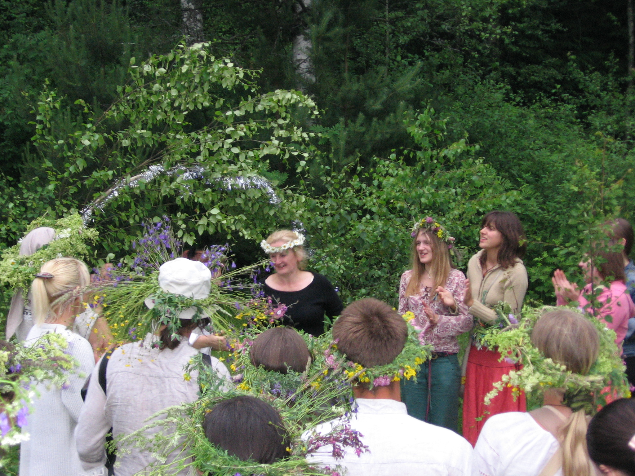 Обряд кумления. Беларусь, 2008 год.